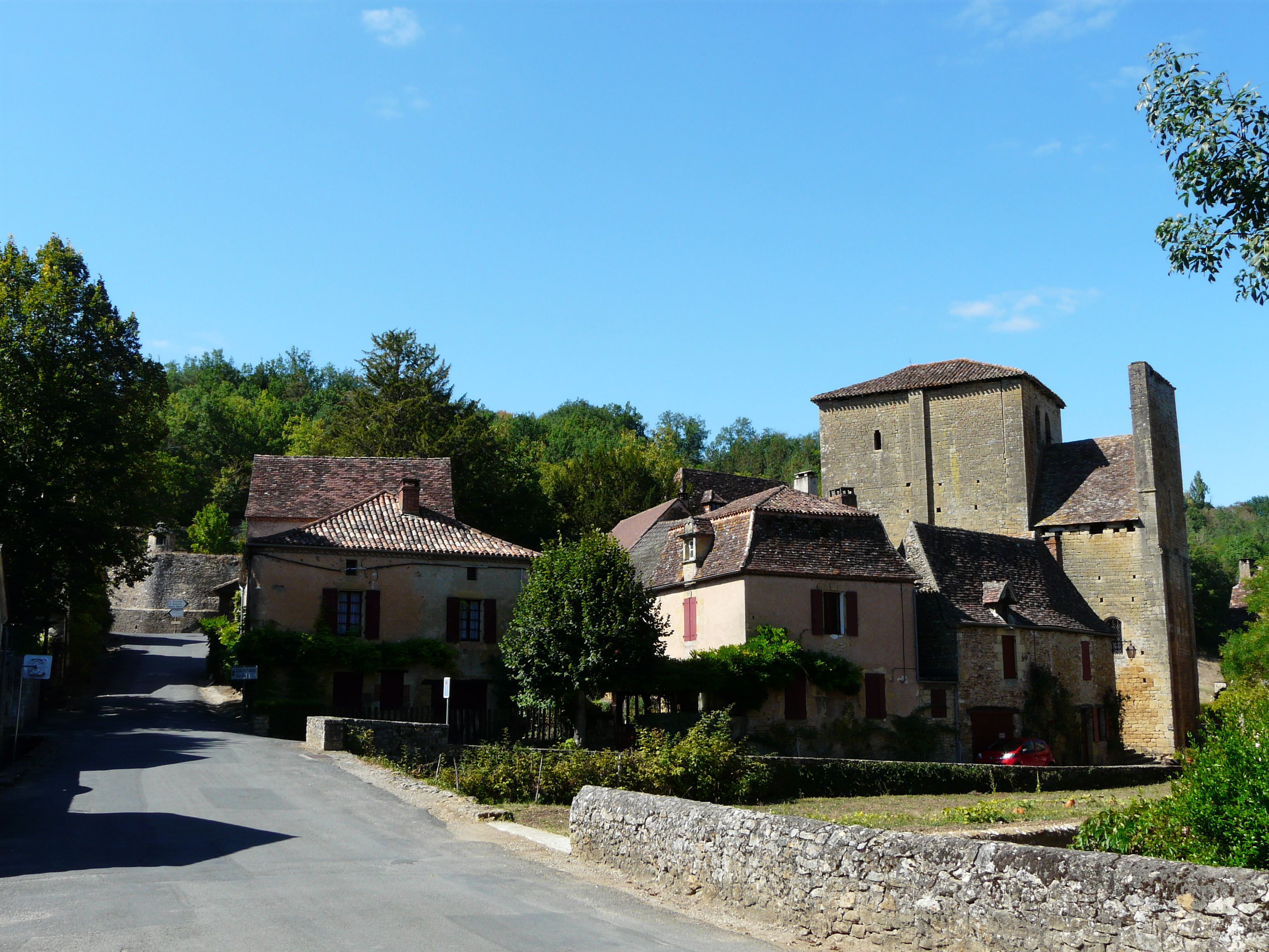 Le village d'Urval, Dordogne, France.